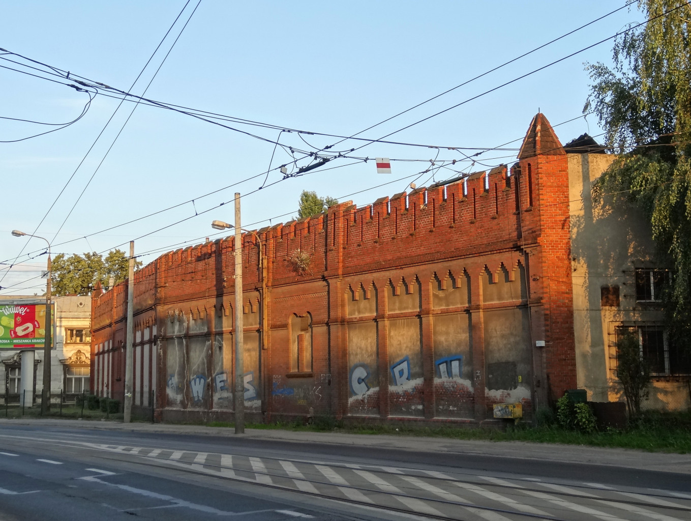 Fabryka Obrabiarek do Drewna przy ul. Nakielskiej 53 w Bydgoszczy (1850)